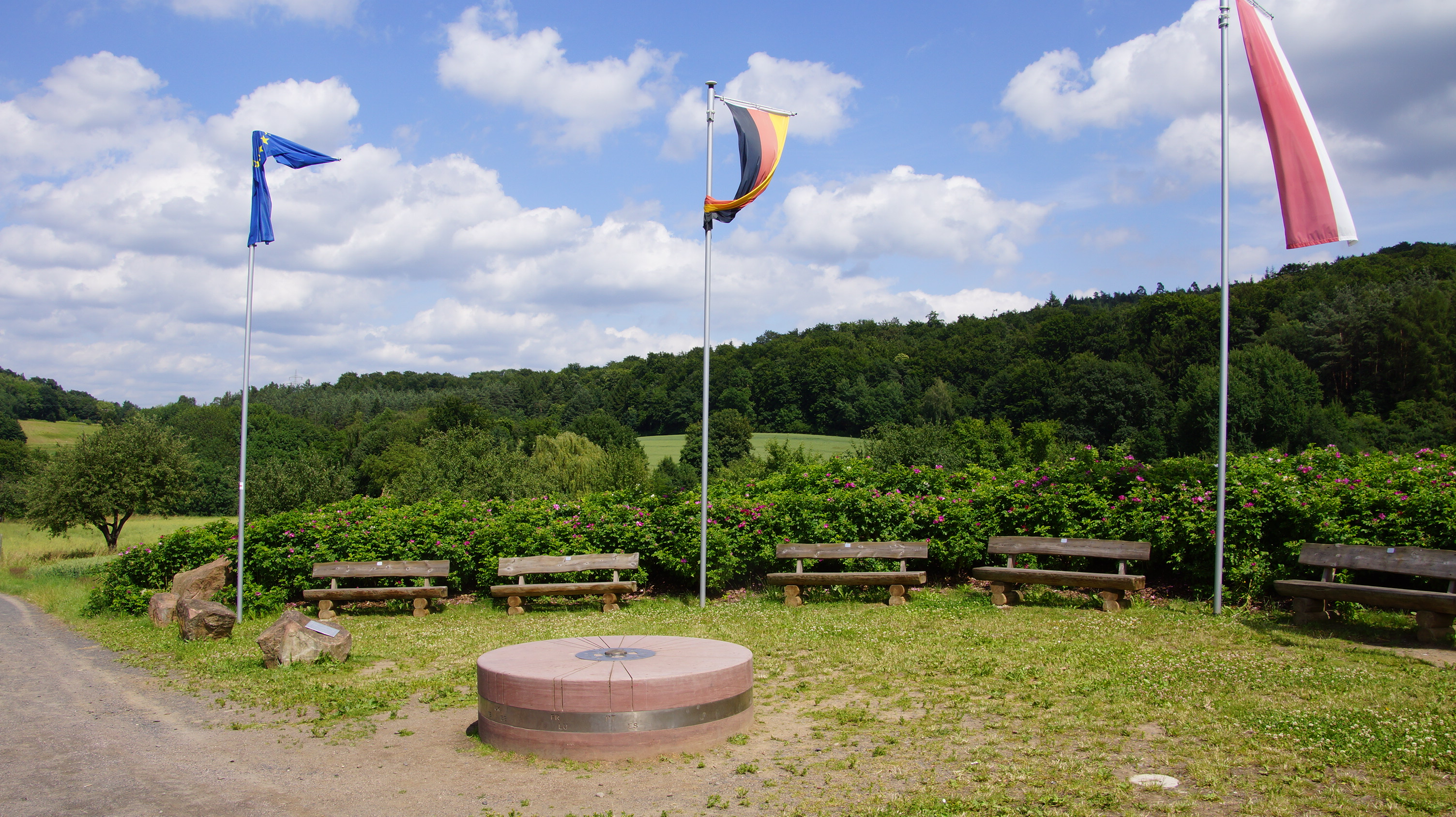 Zwischen der EU-Osterweiterung 2007 und dem Beitritt Kroatiens lag der Mittelpunkt der Europäischen Union in der hessischen Stadt Gelnhausen in Deutschland, im Stadtteil Meerholz. Das Institut Géographique National hatte die genauen Koordinaten ♁50° 10′ 21″ N, 9° 9′ 0″ O berechnet.